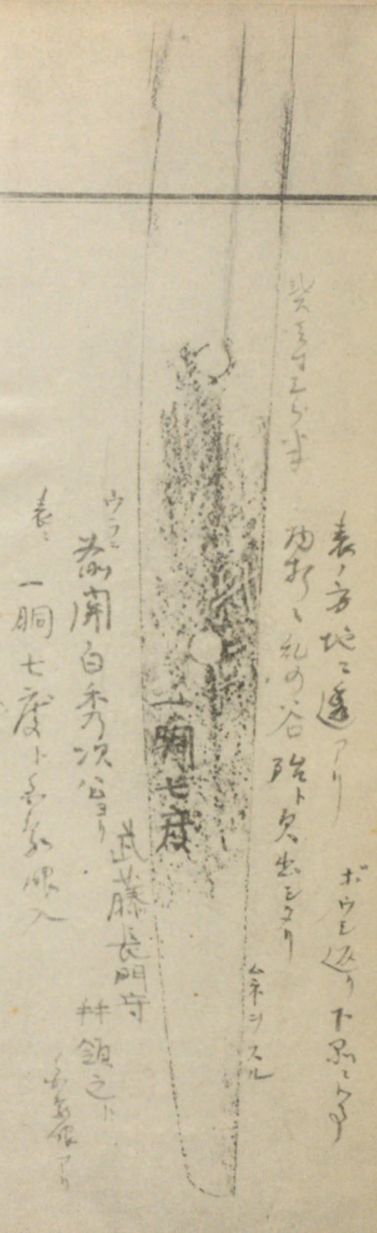 弐尺三寸三分半／表ノ方地に延アリ／ボウシ返り下所に九（く）る（きす？）／は前に乱の谷臨ト欠出シタリ／ムネヲスル／ウラニ前關白秀次公ヨリ武藤長門守拜領之ト金象眼アリ／表に一胴七度ト金象眼入（二尺三寸三分半／表の方地沸あり／鋩子返り下所に来る（疵？）／刃先に乱れの谷のぞむと駆け出したり／棟を磨る／裏に「前関白秀次公ヨリ武藤長門守拝領之」と金象嵌あり／表に「一胴七度」と金象嵌入り）